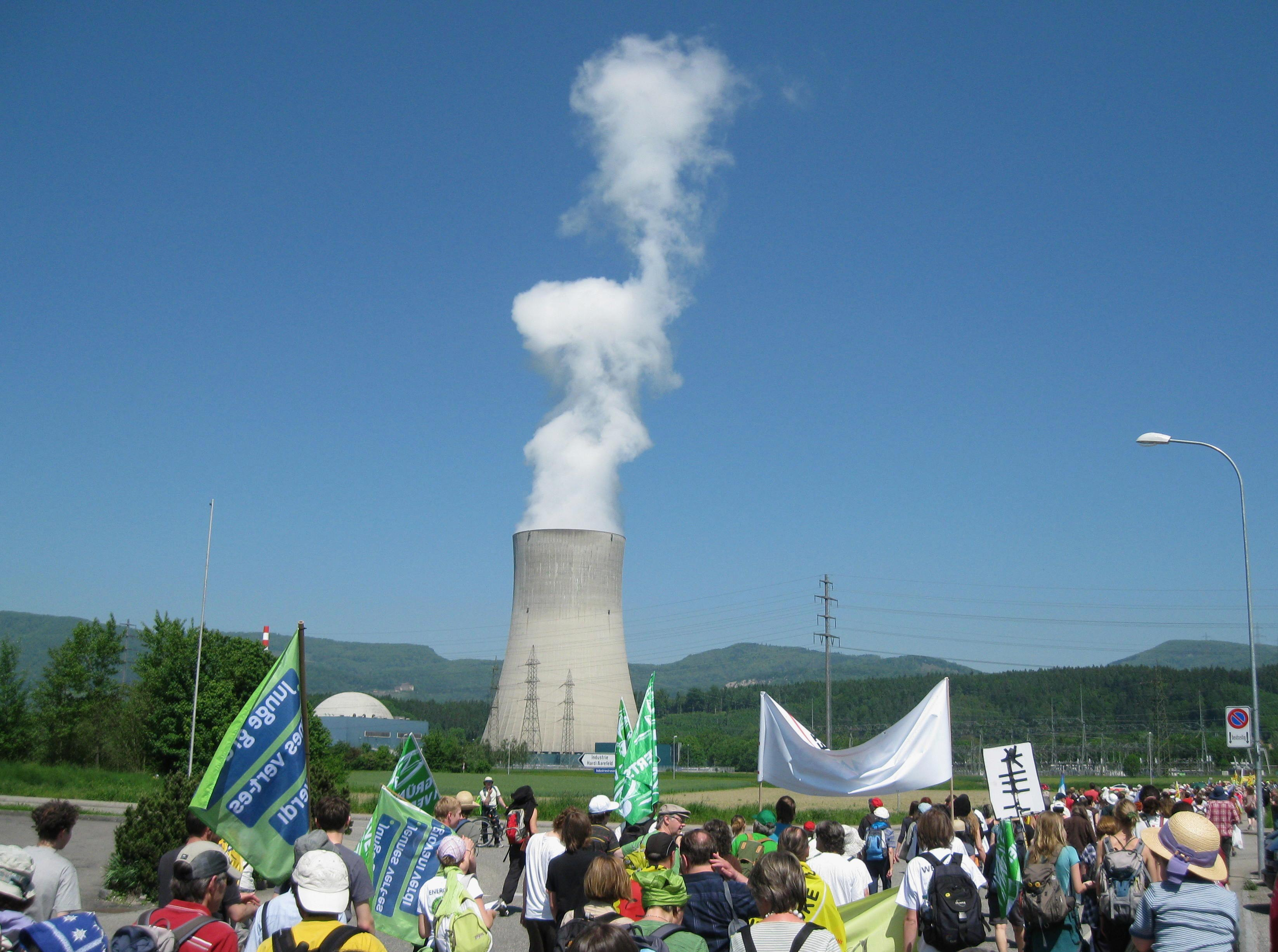 Deomozug gegen AKWs in der Schweiz vom Dorf Däniken Richtung AKW Gösgen